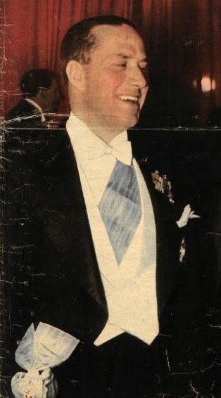 Galeazzo Ciano (przepasany wstęgą Orderu Orła Białego) podczas rautu w Pałacu Brühla w Warszawie (1939).